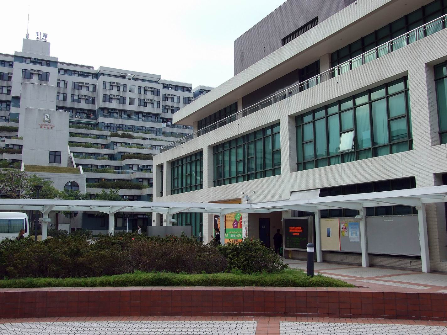 香港教育學院教學大樓南冀